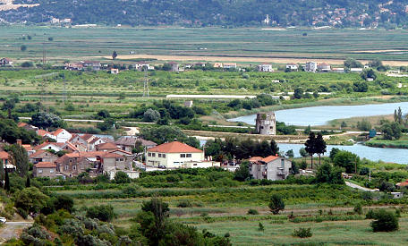 Kula Norinska